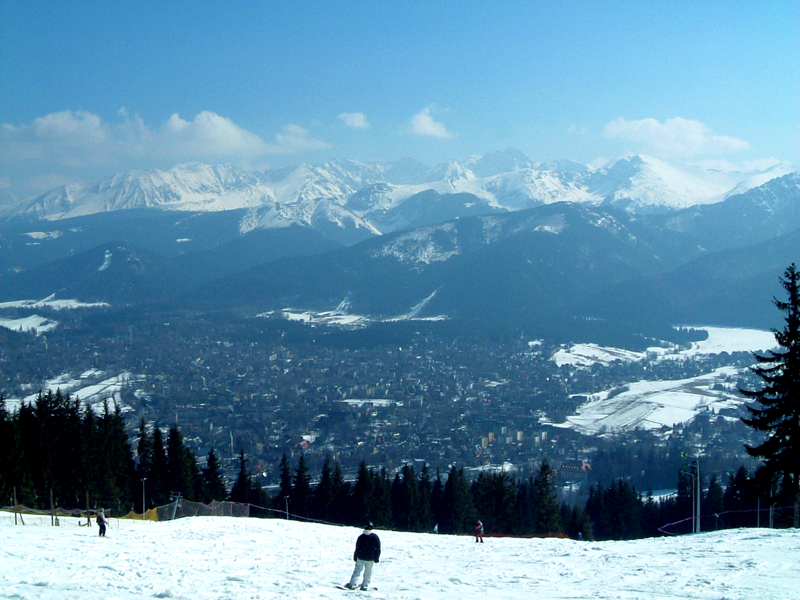 Zakopane from Gubałówka Hill